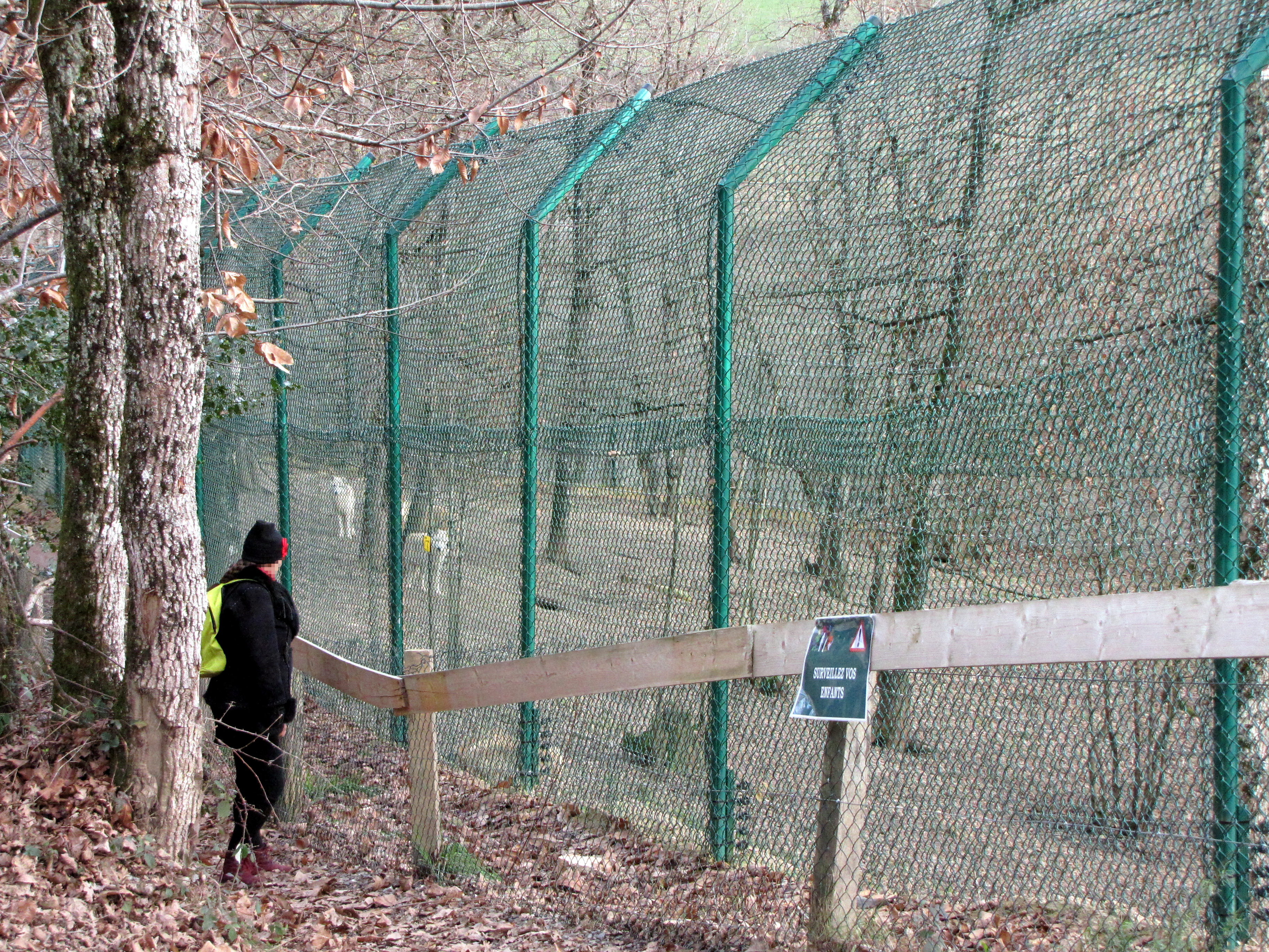 Enclos des loups de Sibérie